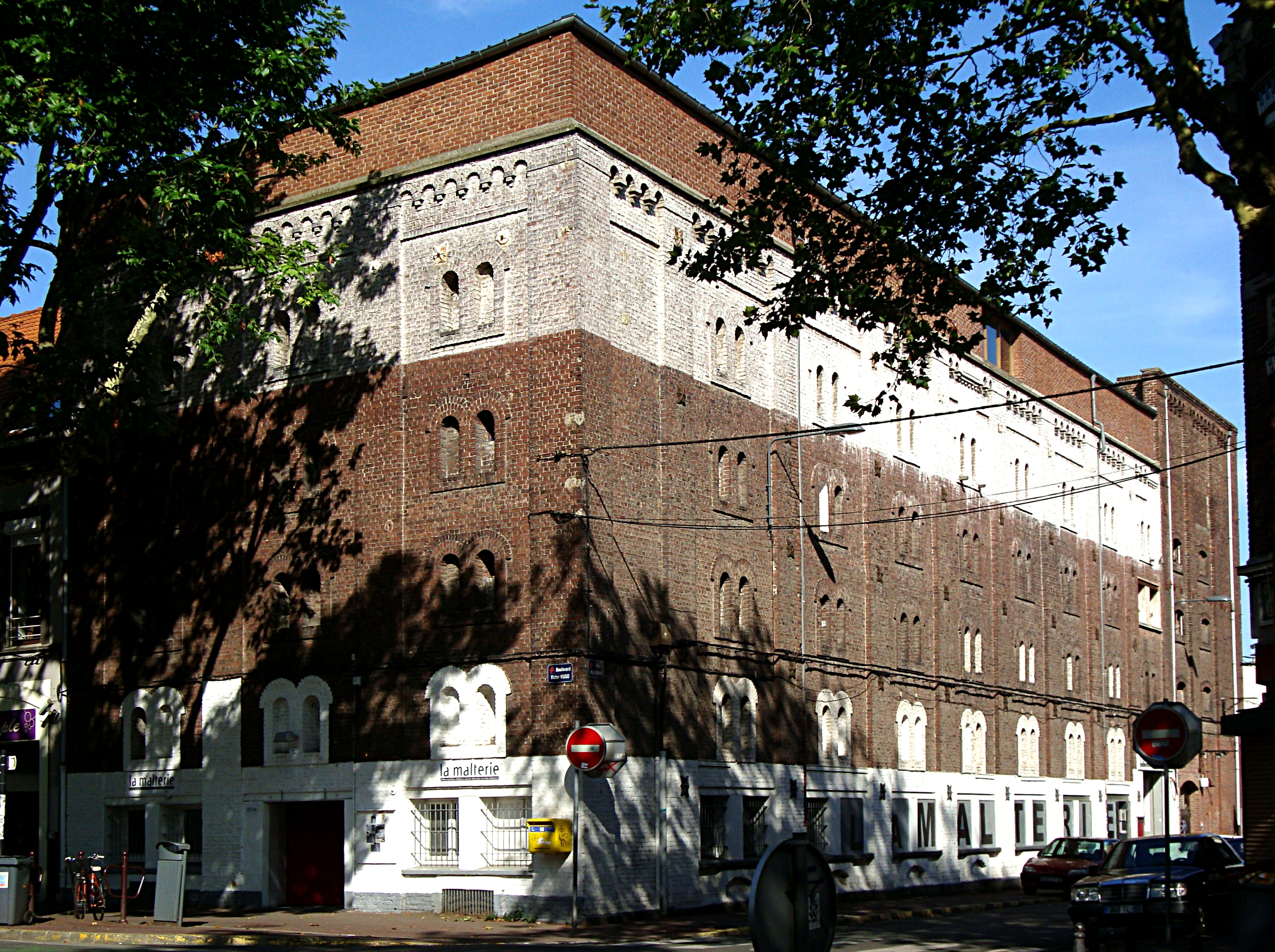 La malterie, ancienne brasserie reconvertie en 1995 en lieu de résidence d'artistes, de spectacle et d'exposition, dans le quartier de Wazemmes à Lille.